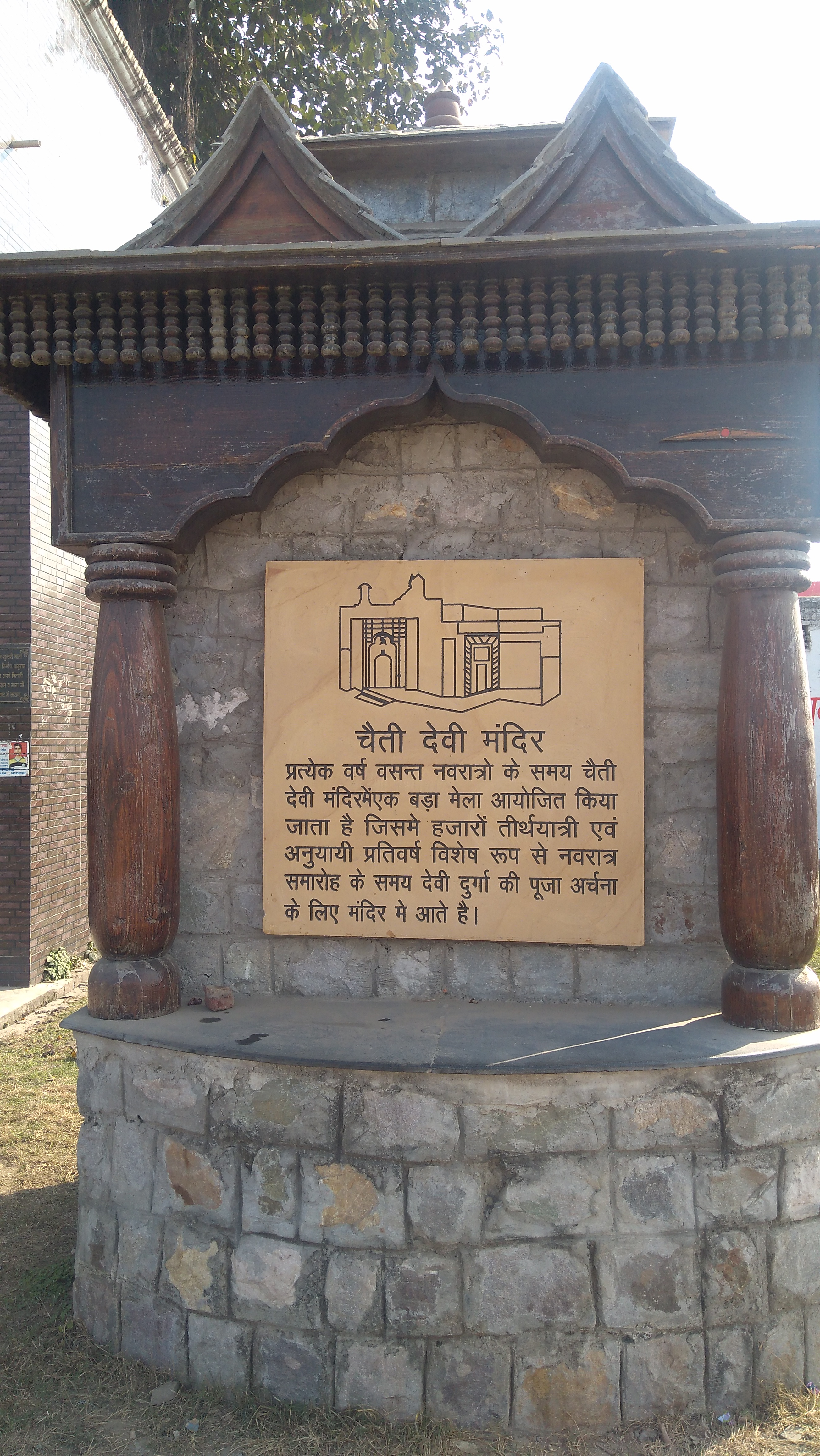 Mata Bala Sundari temple, Kashipur, Uttarakhand